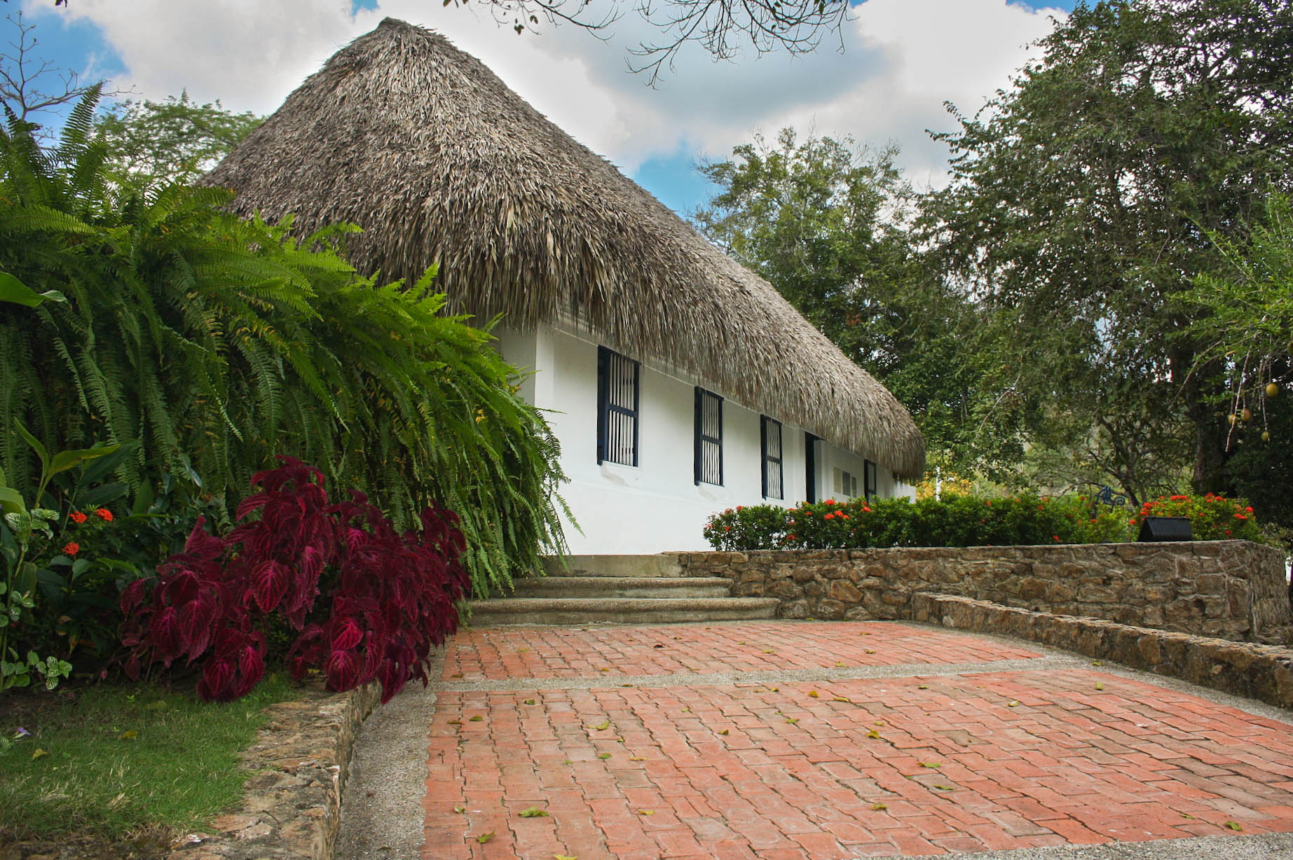 Entrada de la Casa-Museo del poeta Julio Flórez.